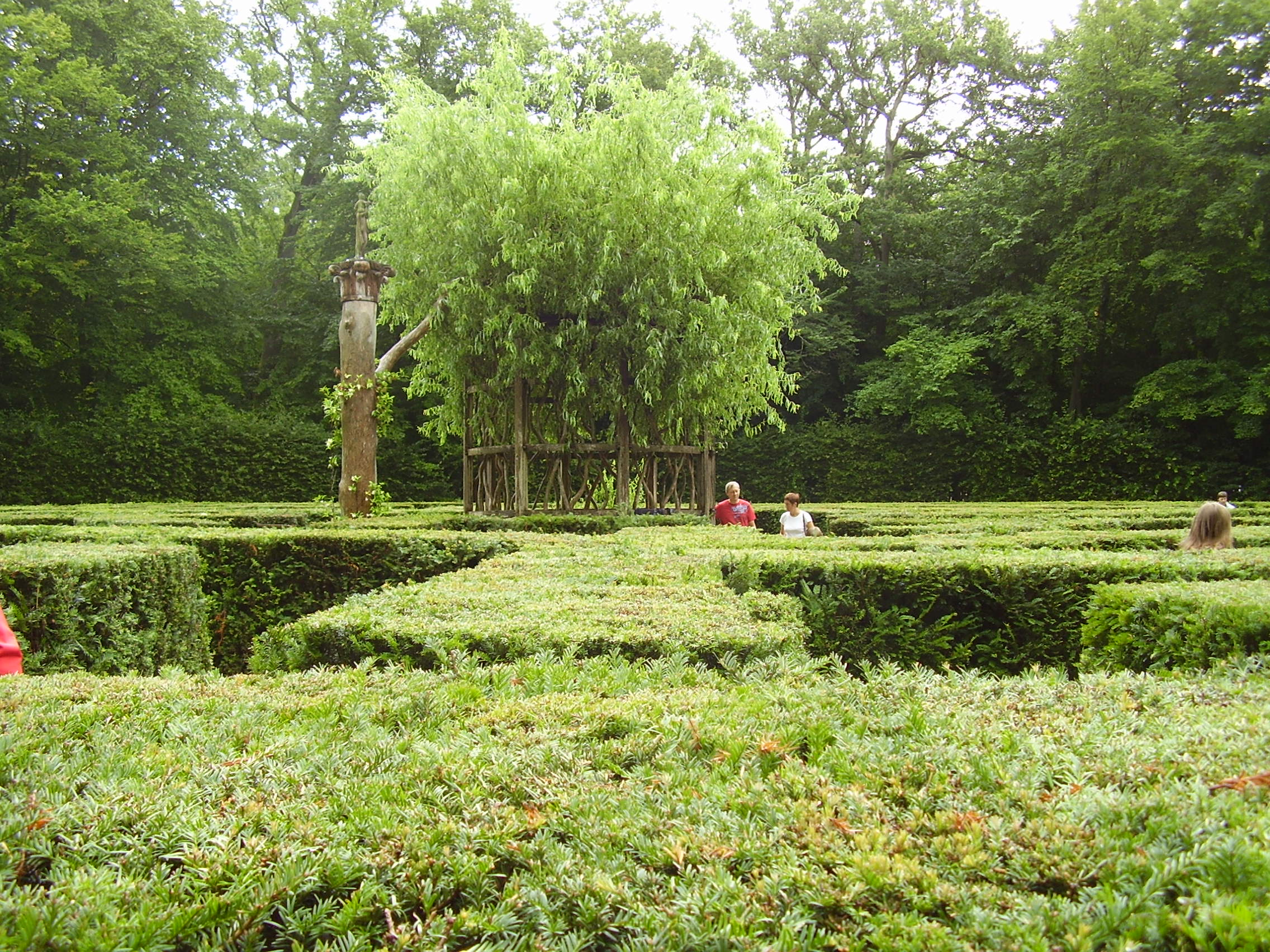 Château de Chenonceau, France